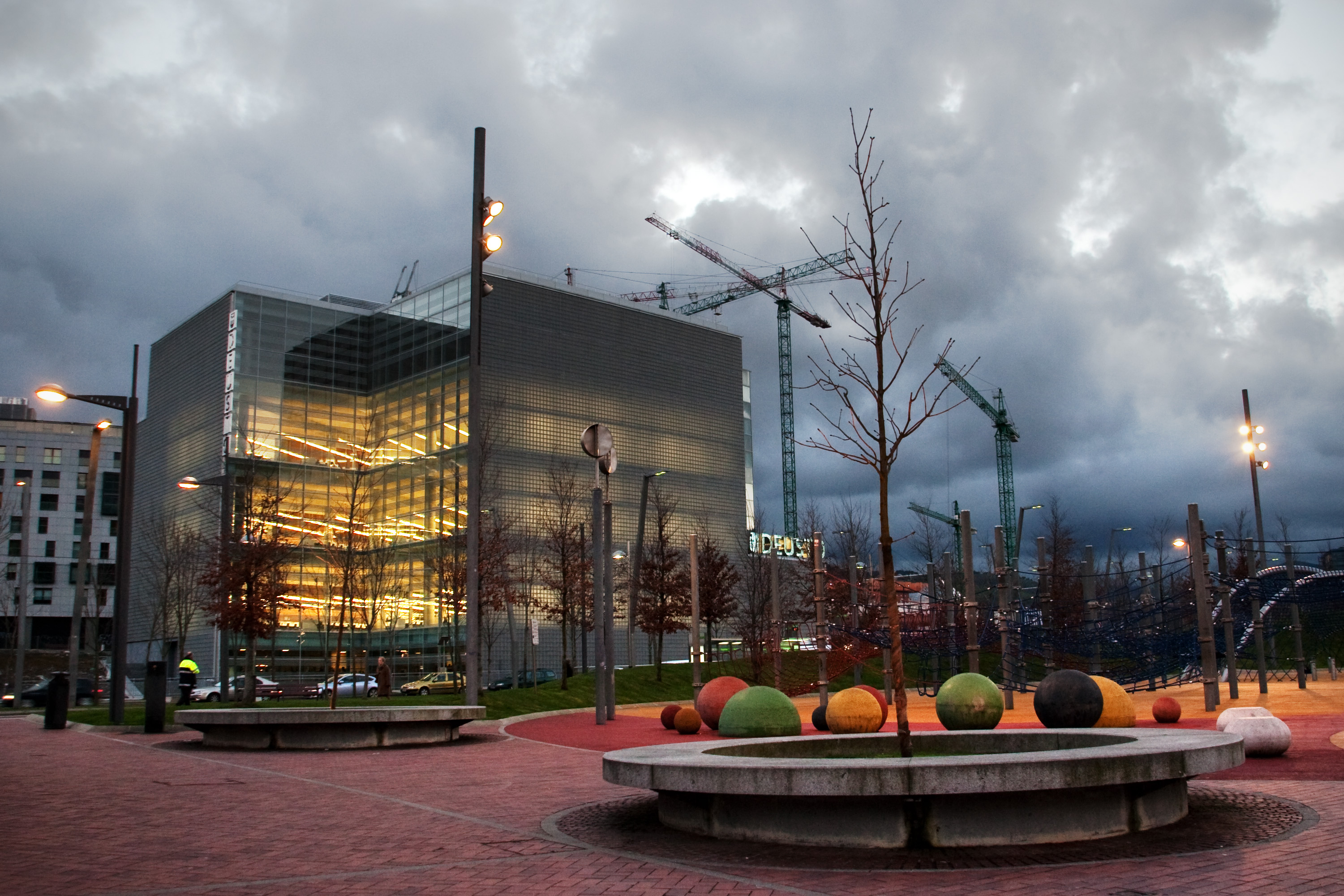 Biblioteca